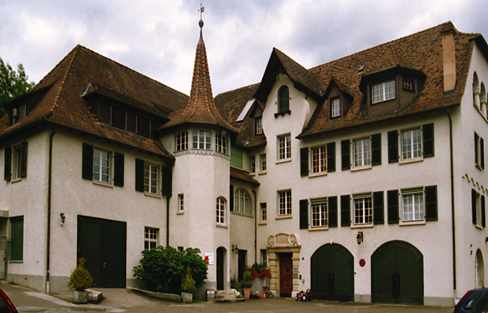 Schloss Zwingen, Kernburg, Verwaltungs- und Wohngebäude